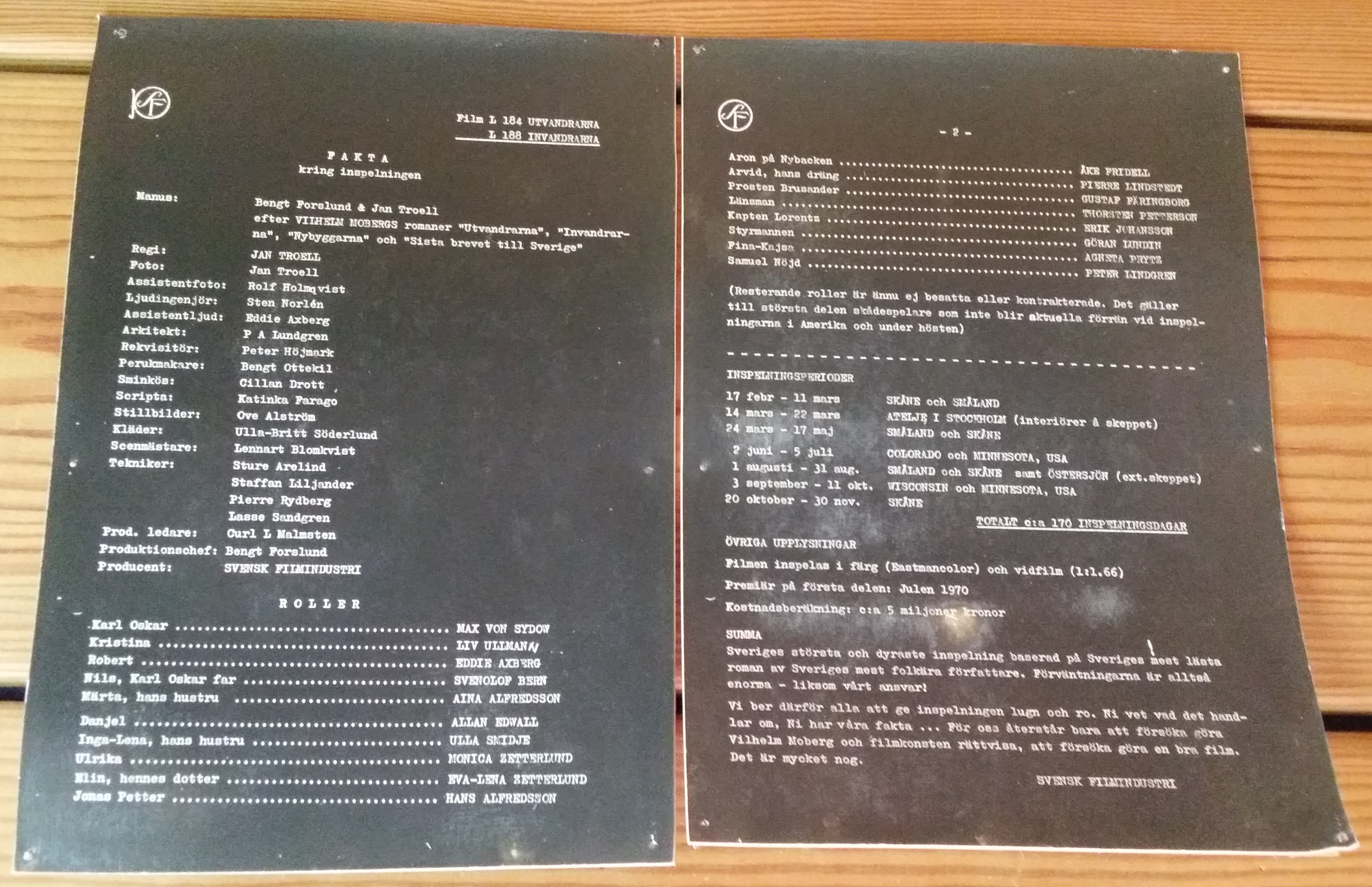 Filmfakta om "Utvandrarna" från 1971, i regi av Jan Troell. Finns att beskåda på Klasatorpet i Småland.